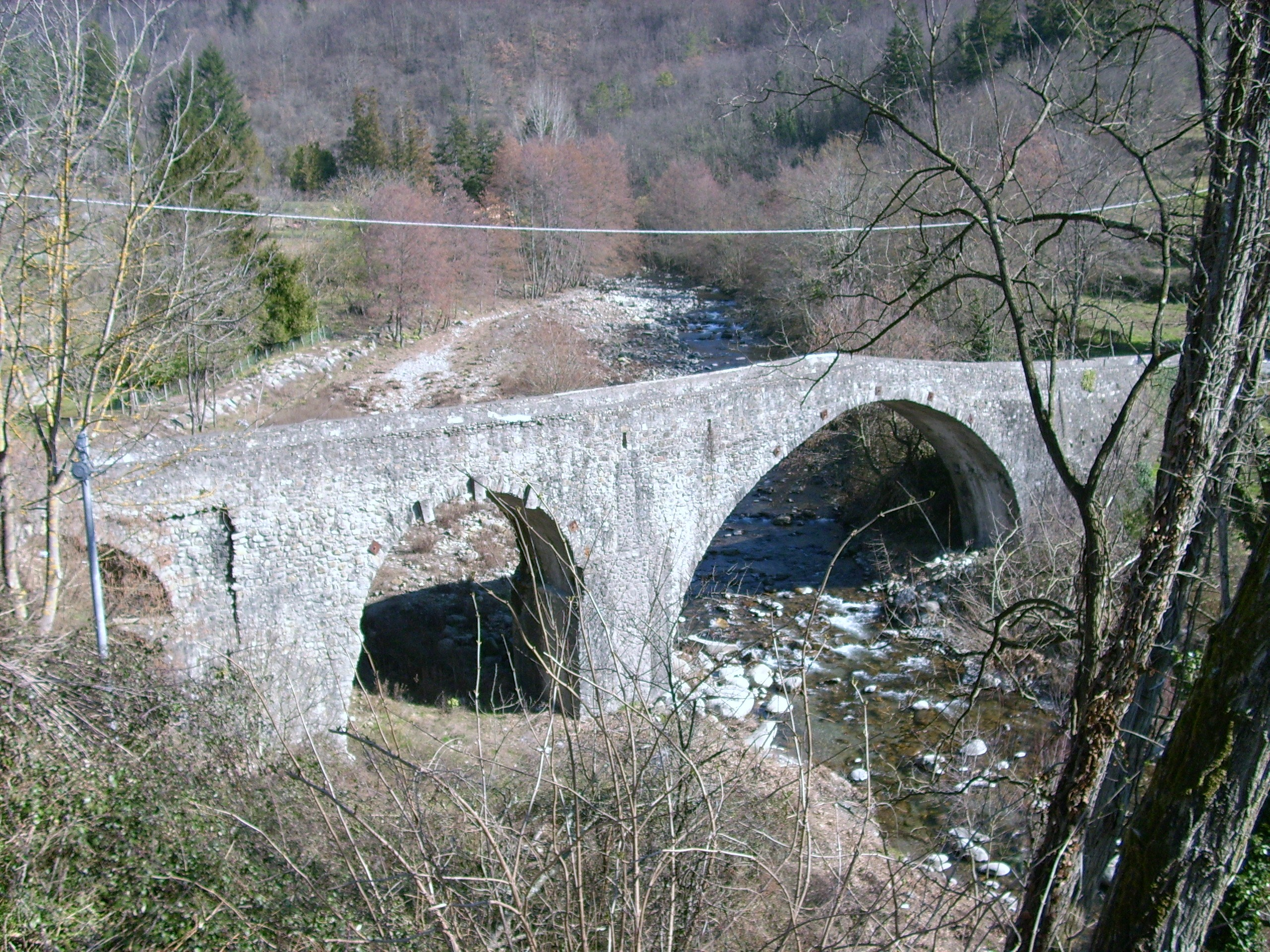 Ponte medievale presso il torrente Gottero, Sesta Godano, Liguria, Italy